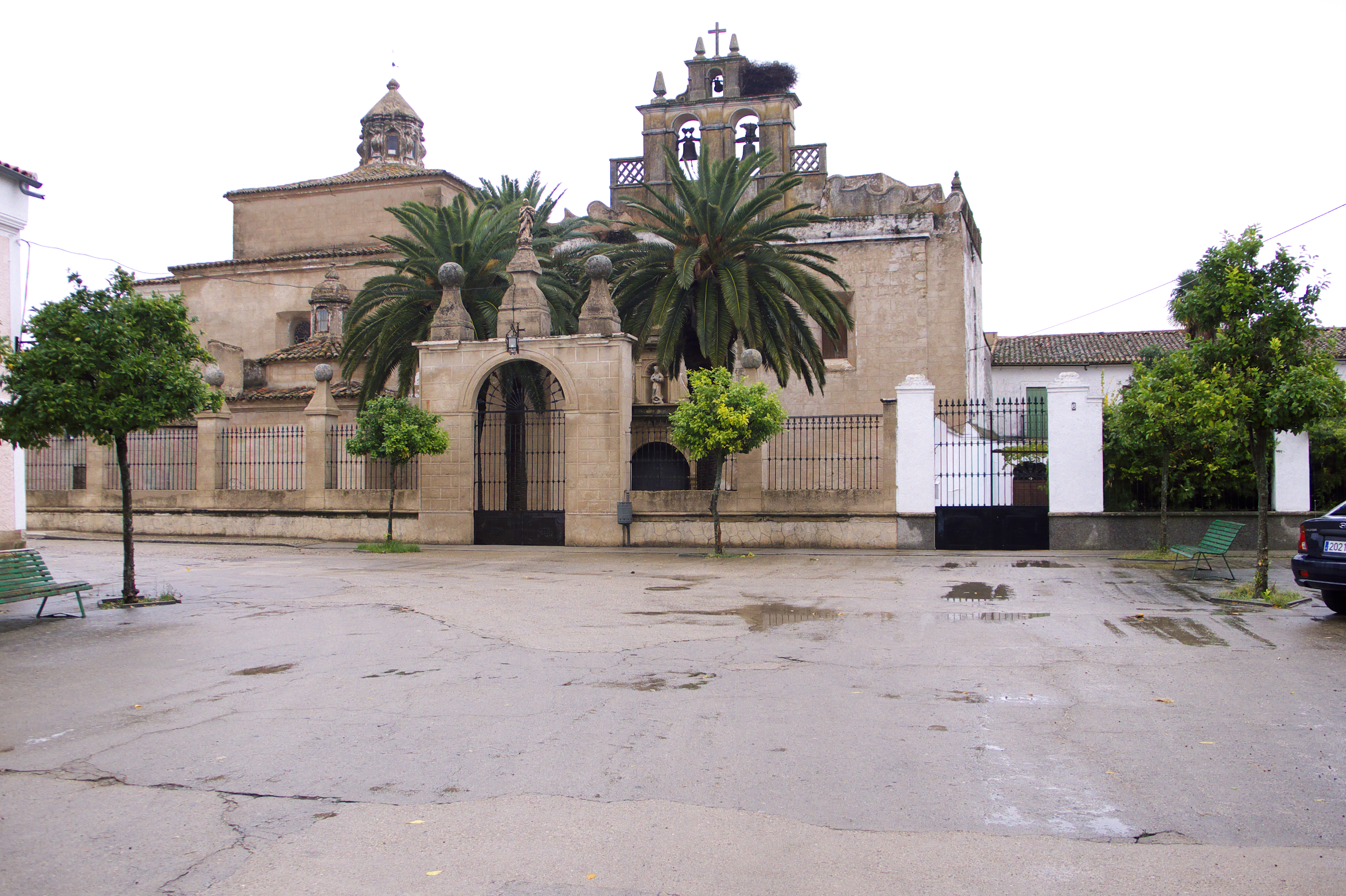 Antigua Iglesia del Convento Franciscano de la Madre de Dios (1506)